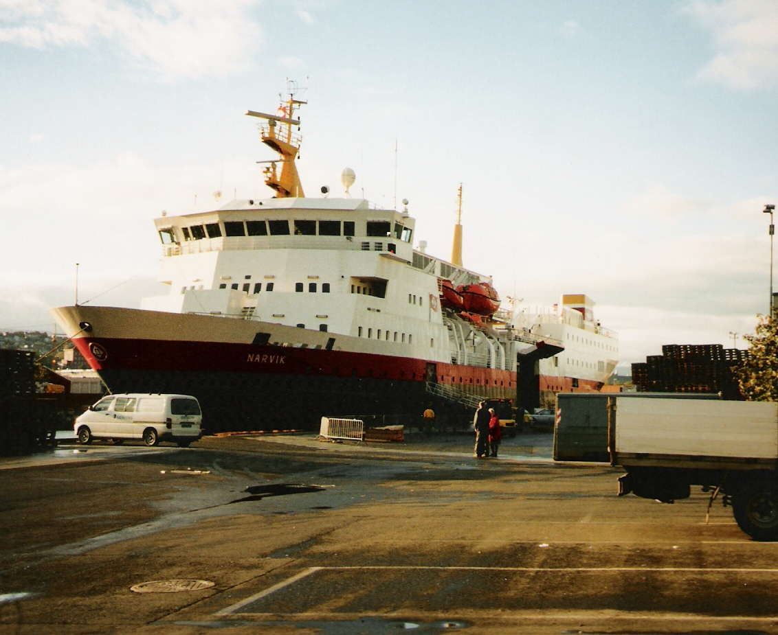 Hurtigruten-Ship Narvik